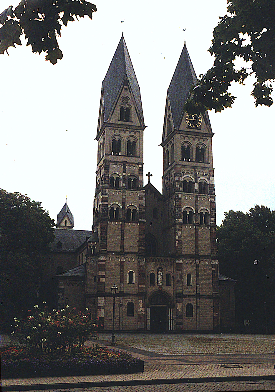 Базилика св.Кастора в Кобленце